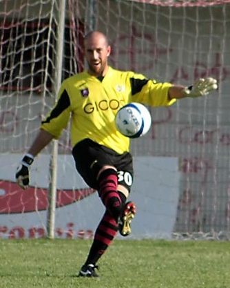 Andrea Campagnolo